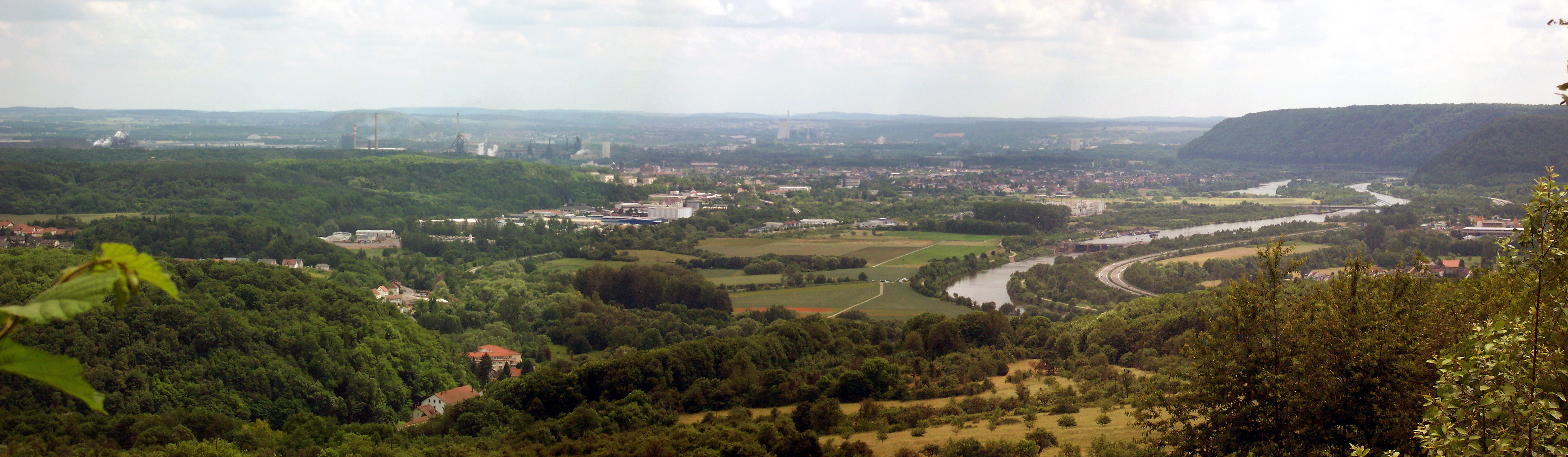 Blick vom Beckinger Weinberg über Dillingen ins Saartal Richtung Saarbrücken